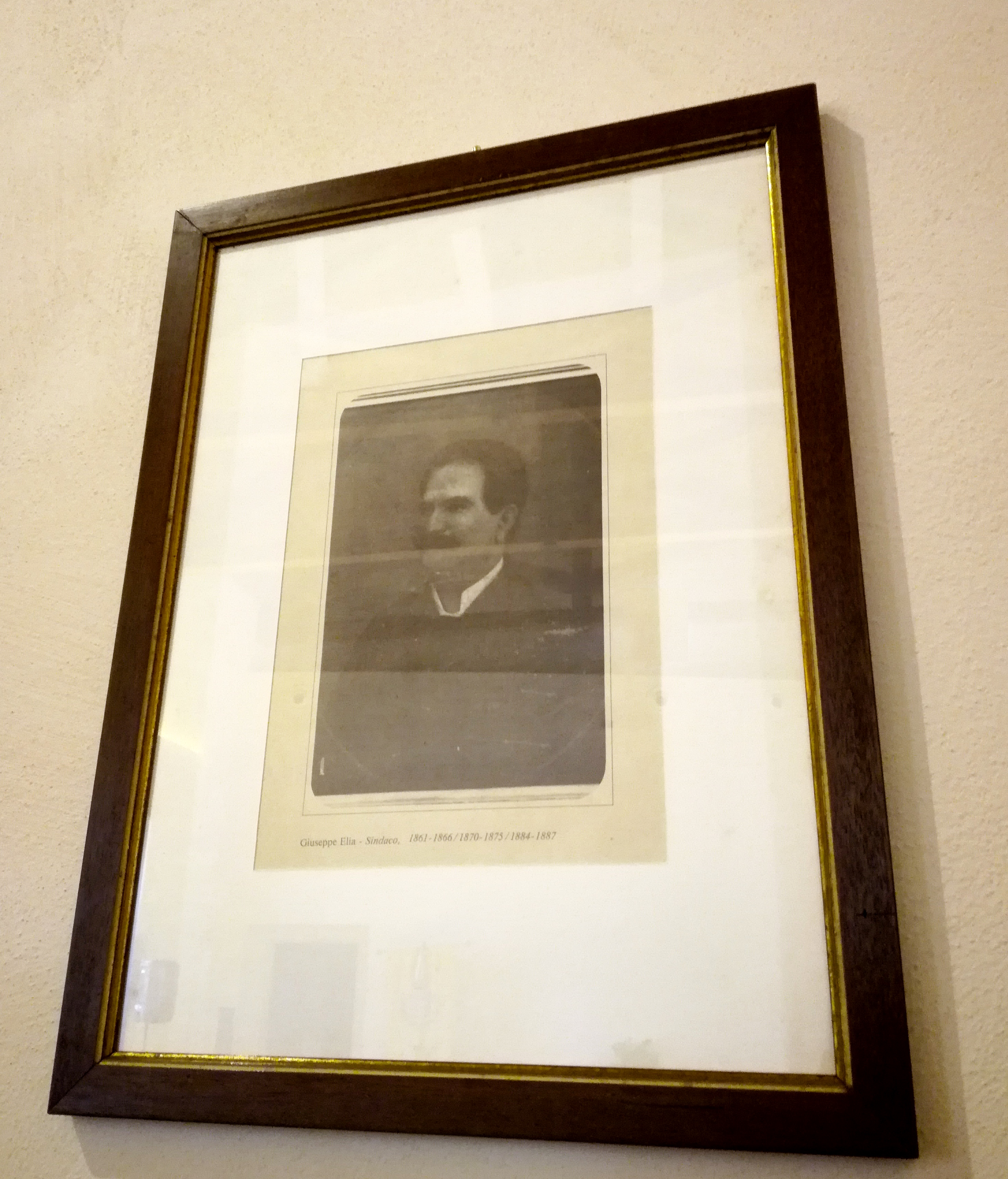 Foto tratta dal libro "Ceglie Messapica, una Città. Cronaca fotografica 1847-1947" (Galatina, Editrice Salentina, 1980) di Michele Ciracì e Gaetano Scatigna Minghetti ed esposta presso il salone dei Sindaci nel Castello Ducale di Ceglie.